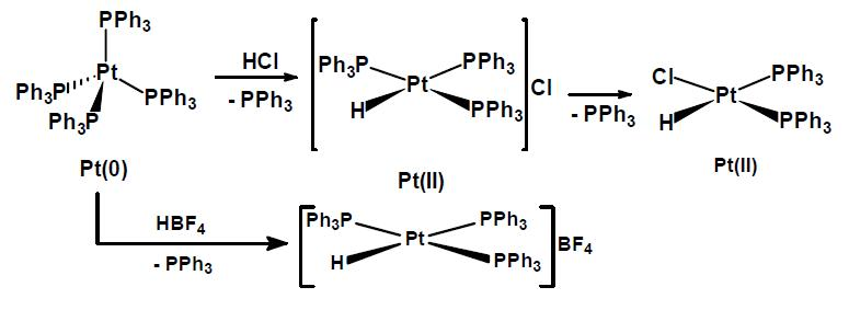 Addició oxidant (mecanisme iònic)